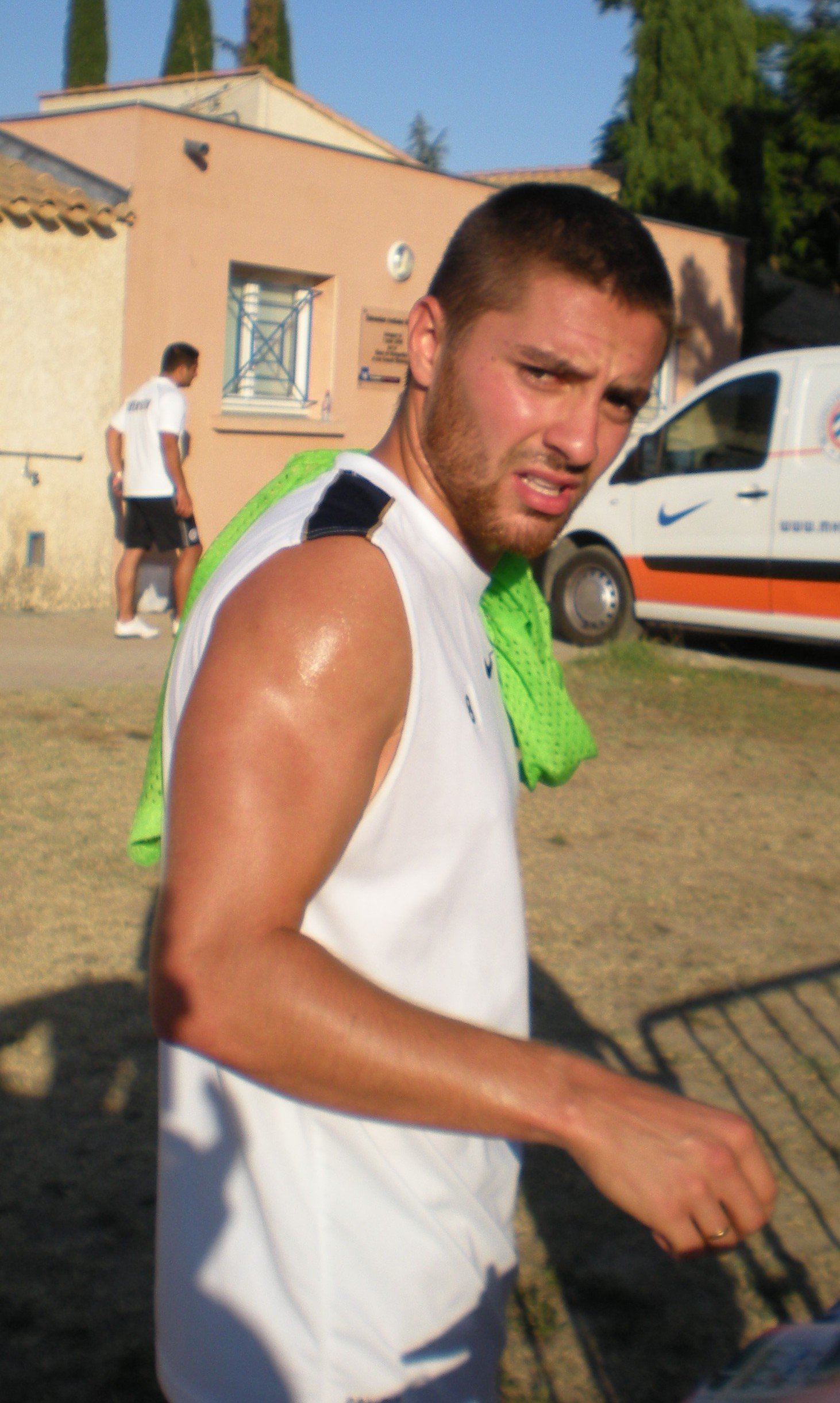 Anthony Mounier, fin de l'entrainement.